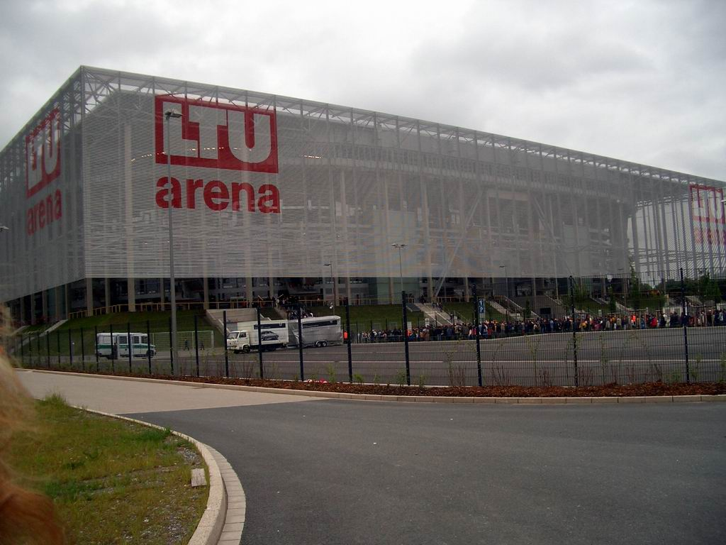 LTU arena, Düsseldorf: Training der DFB-Auswahl vor der WM 2006